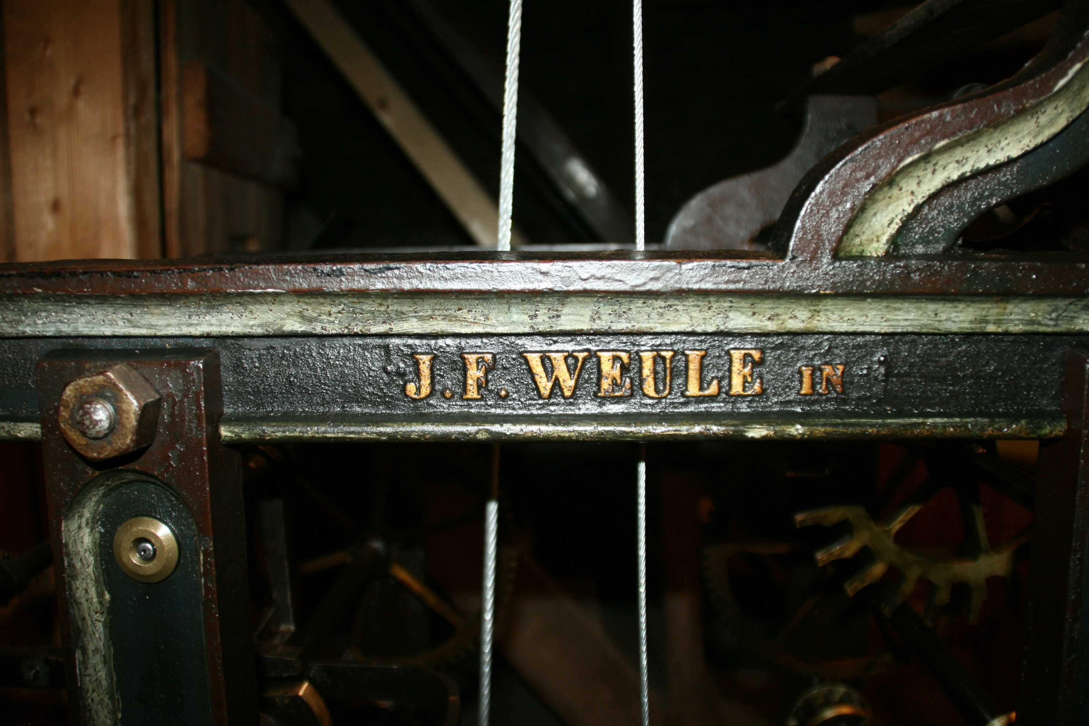 1. Teil der Inschrift "J.F. Weule in" an der Kirchturmuhr der Christuskirche in Plettenberg.